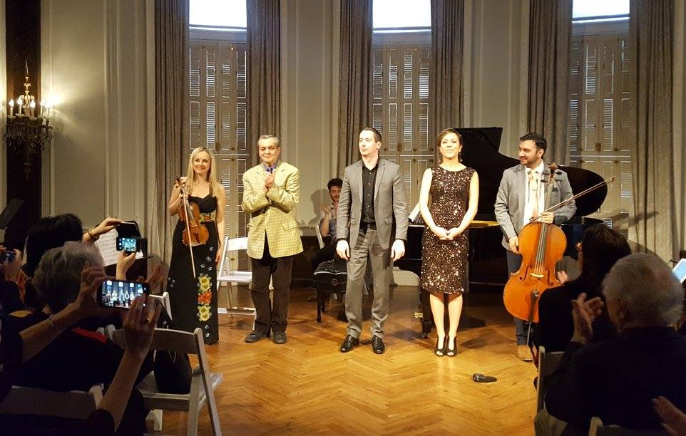 Зустріч композитора Євгена Станковича, Український інститут Америки, 2017 р.